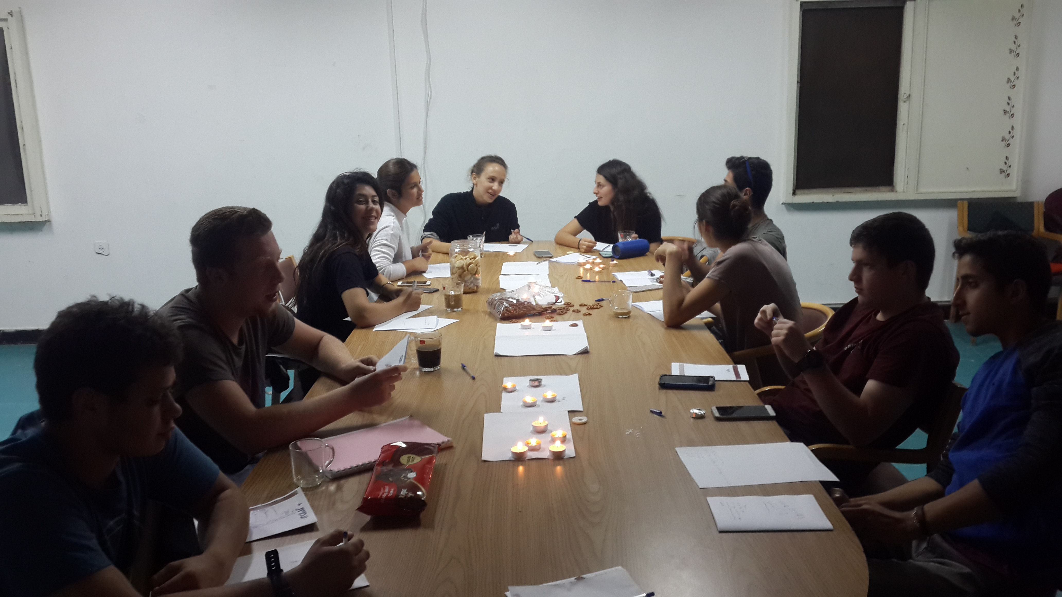 דוגמא לערב קבוצה בתהליך סיום יב